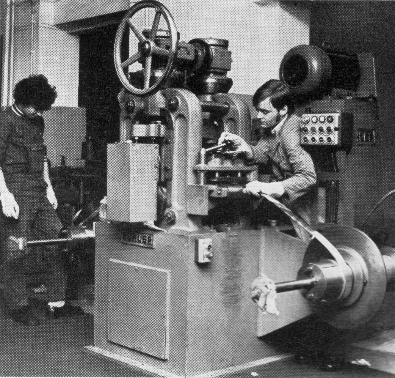 Herstellung eines Pelz-Klipverschlusses der Firma C. Keskari, den „Keska“. Serienstanze für das Unterteil der Verschlüsse.